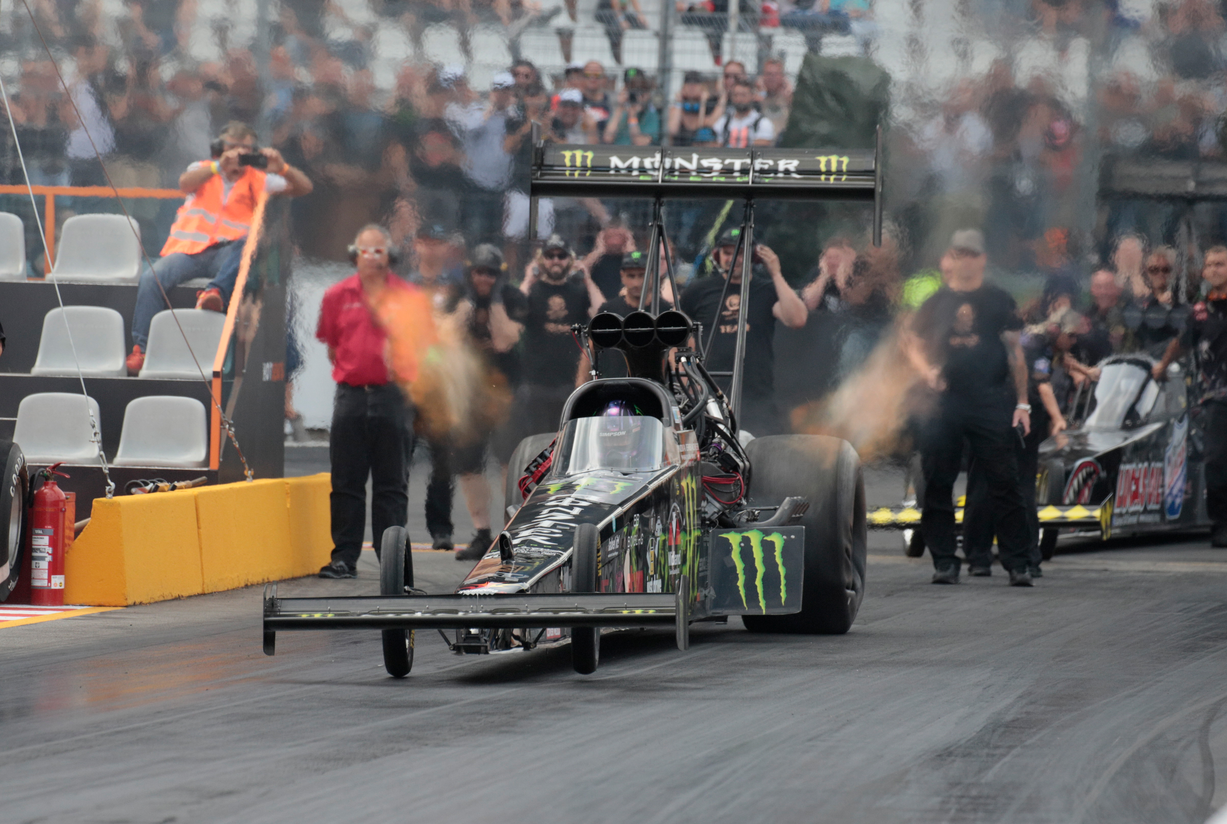 Jndia Erbacher (CH), Top Fuel Dragster Pilotin, NitrOlympX 2019